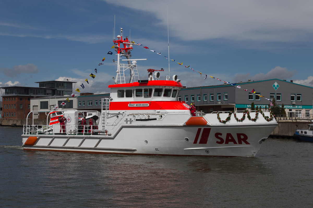 Seenotrettungskreuzer "Ernst Meier-Hedde" am 30. Mai 2015 nach seiner Taufe im Kaiserhafen von Bremerhaven.